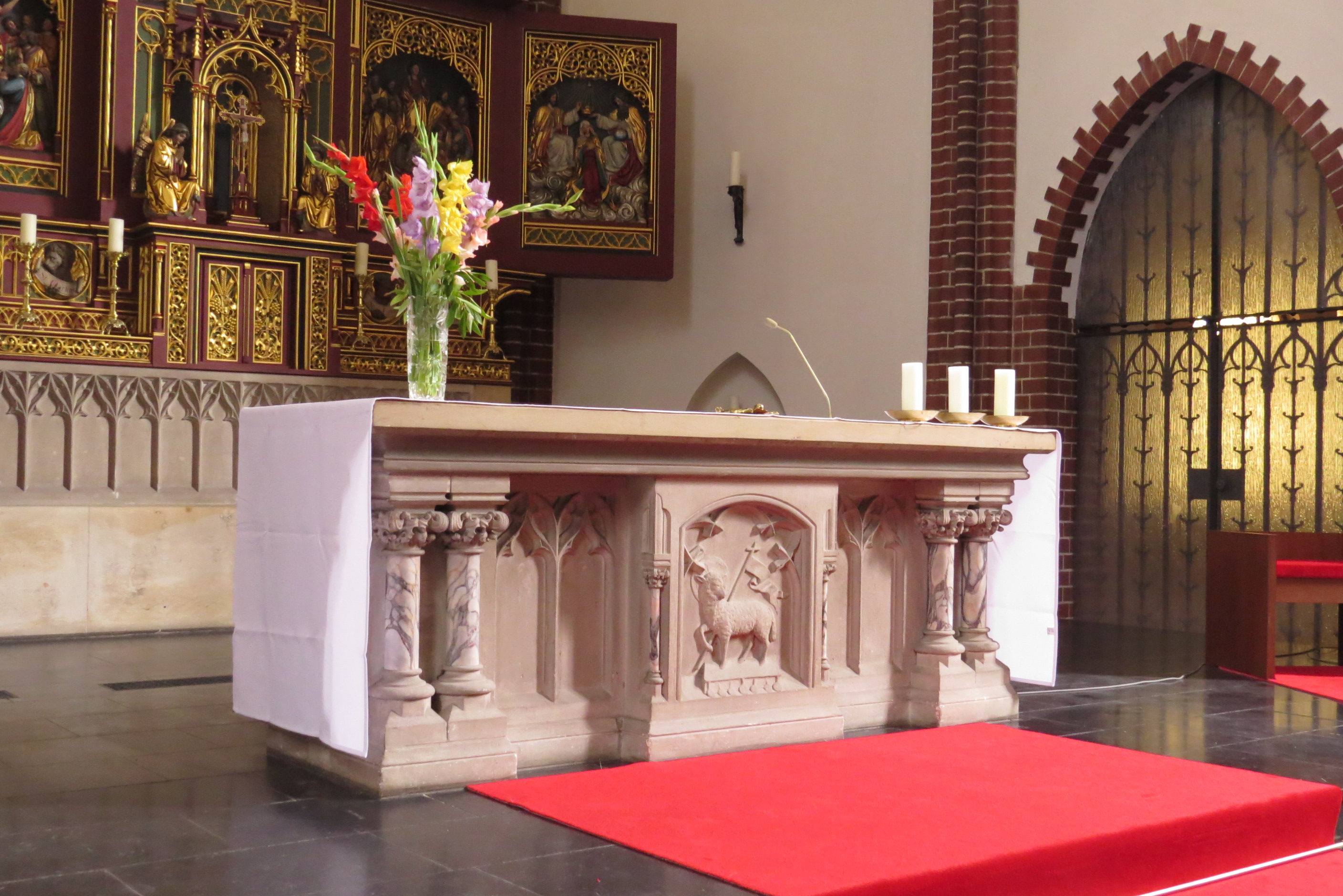 Kirche St. Georg, Berlin-Pankow, Altartisch